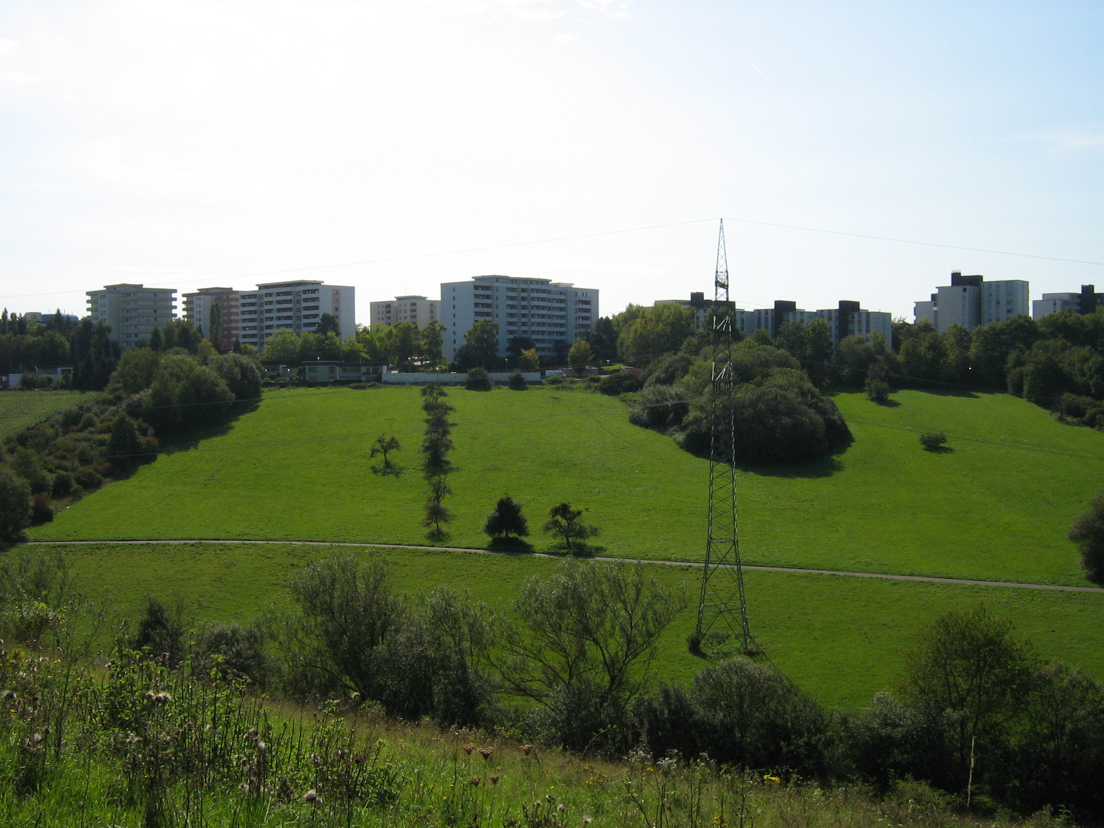 Blick auf das Wohngebiet Trier-Weidengraben